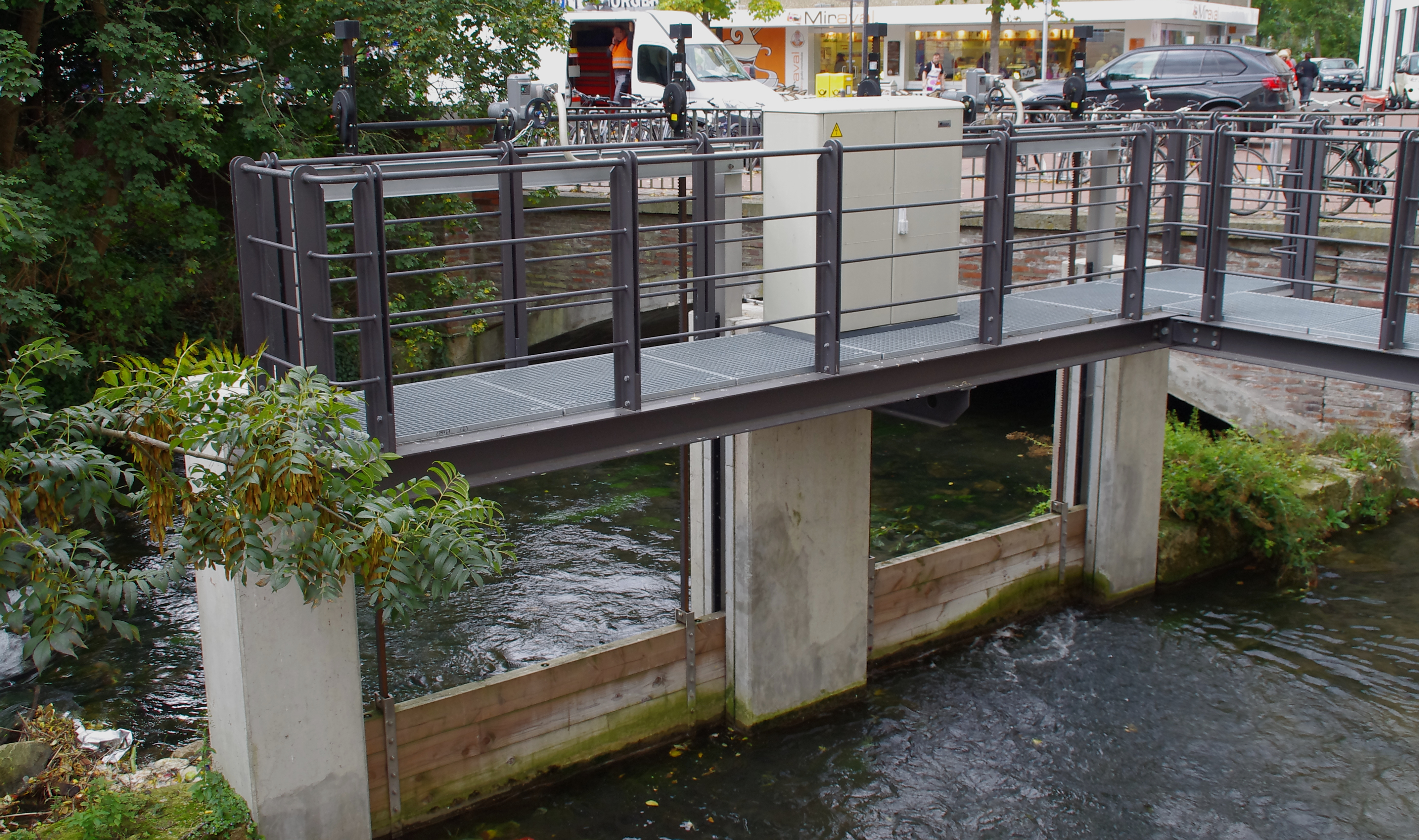 Schütz am Kobelgraben (Ulm)